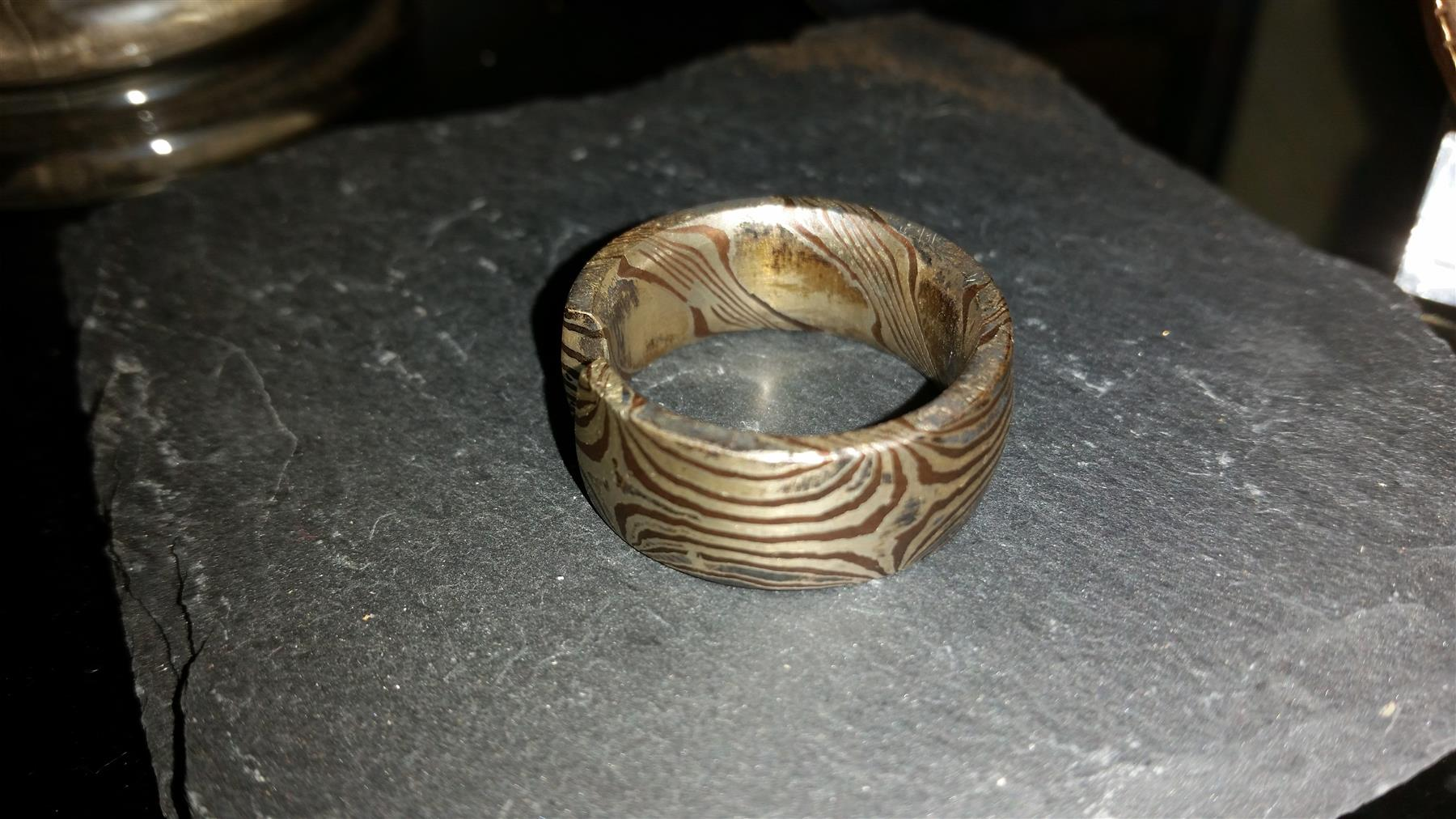 Mokume Gane Damast Ring unter Verwendung von Corinthium aes statt Shakudo. Hergestellt von der Manufaktur Markus Eckardt, Ensdorf (Saar, Einer der ersten Versuch.